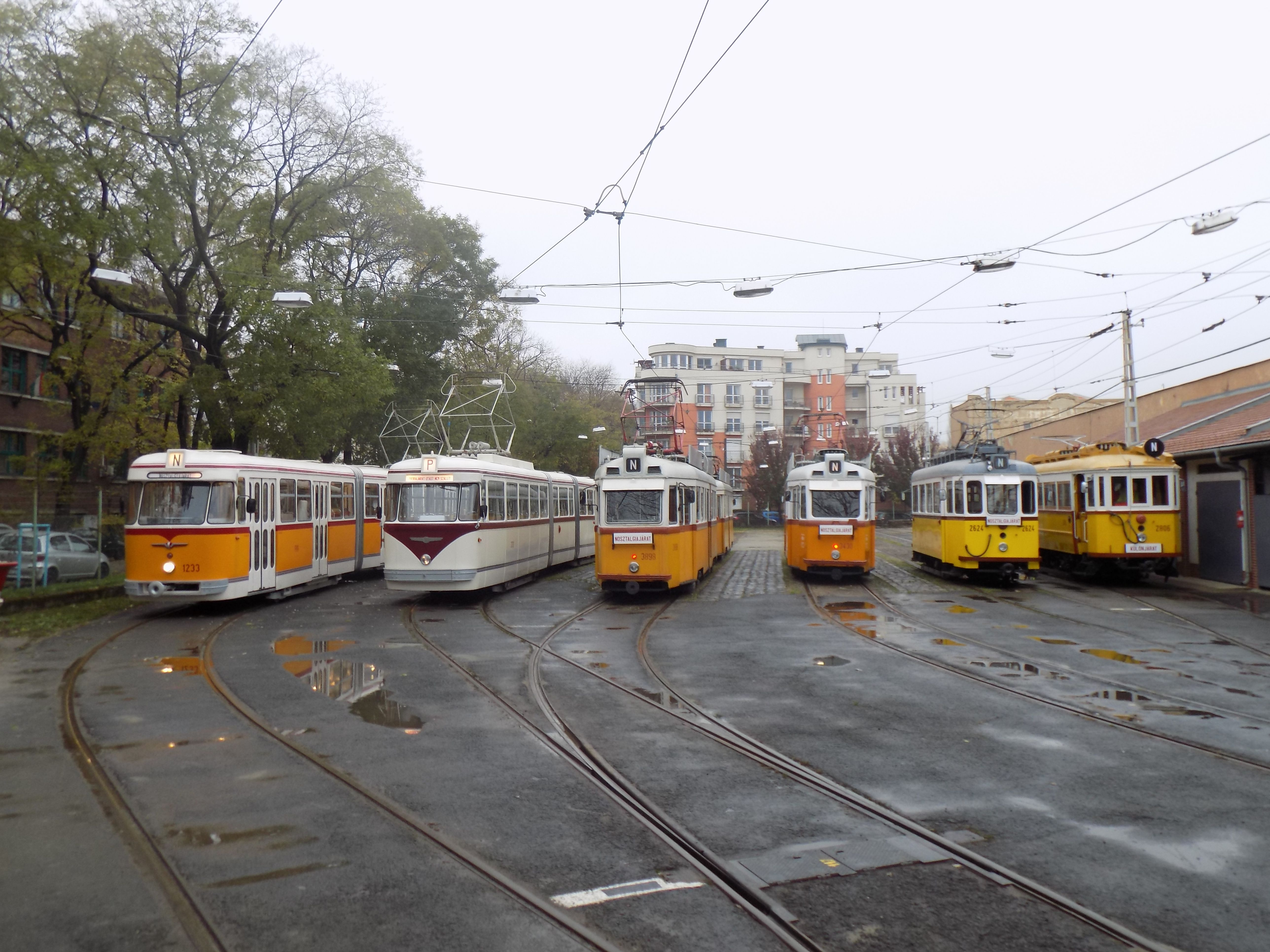 FVV CSM–1, FVV CSM–4, Ganz UV, Ganz MUV, BVVV G és BVVV K típusú nosztalgiavillamosok a Kelenföld kocsiszínben